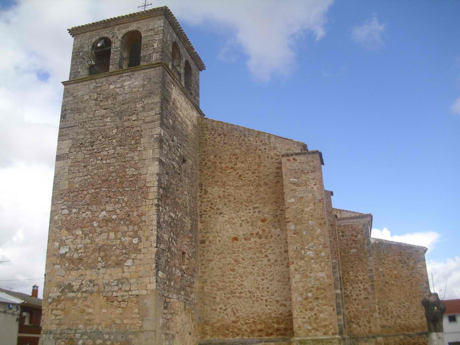 Iglesia de Ntra. Sra de la Asunción. Puebla de Almenara. Cuenca